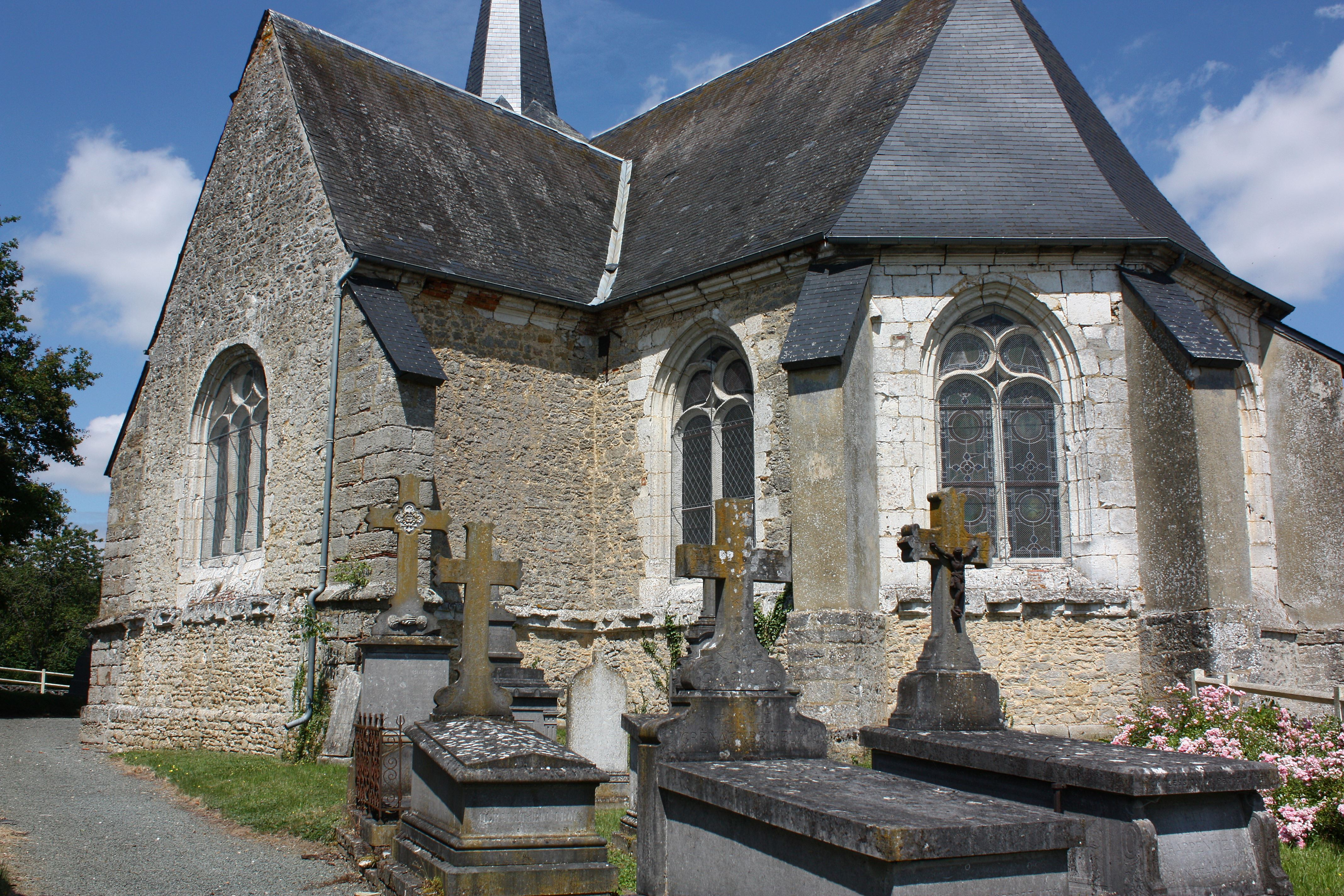 Sully - Eglise Saint-Pierre, vue du Sud-Est